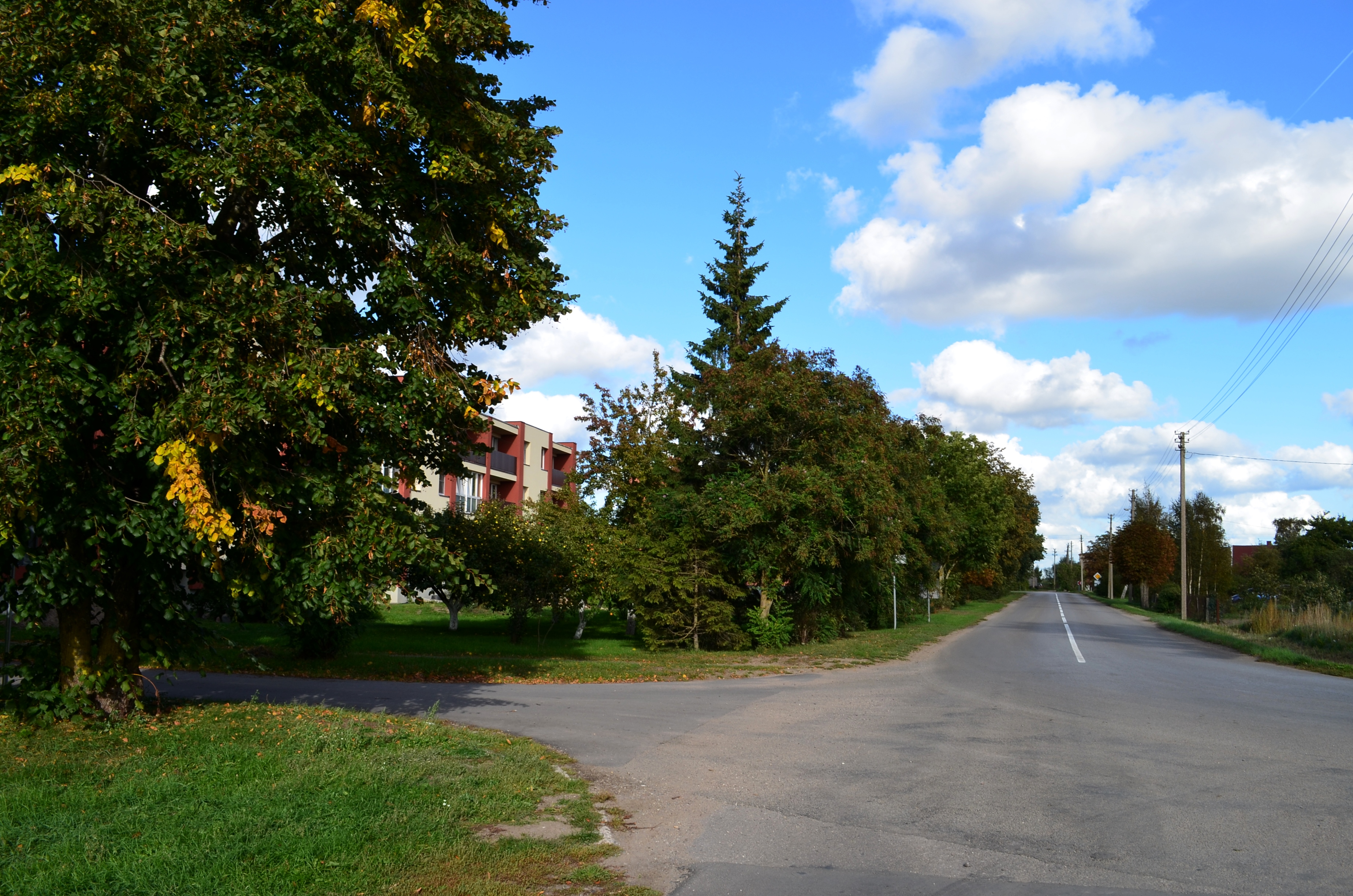 Dreverna, Klaipėdos raj.